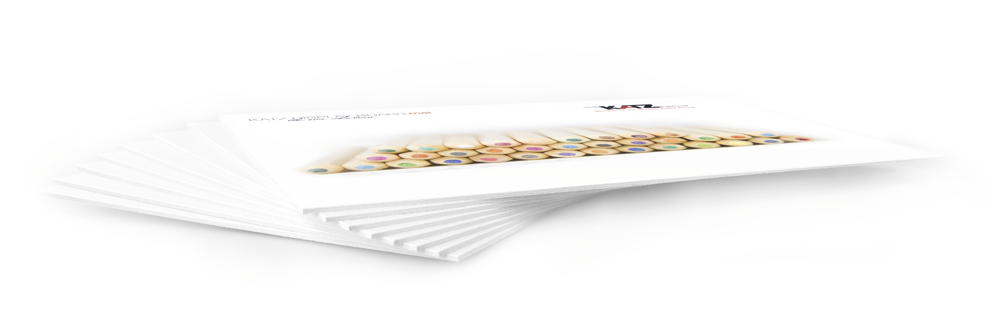 KATZ DISPLAY BOARD